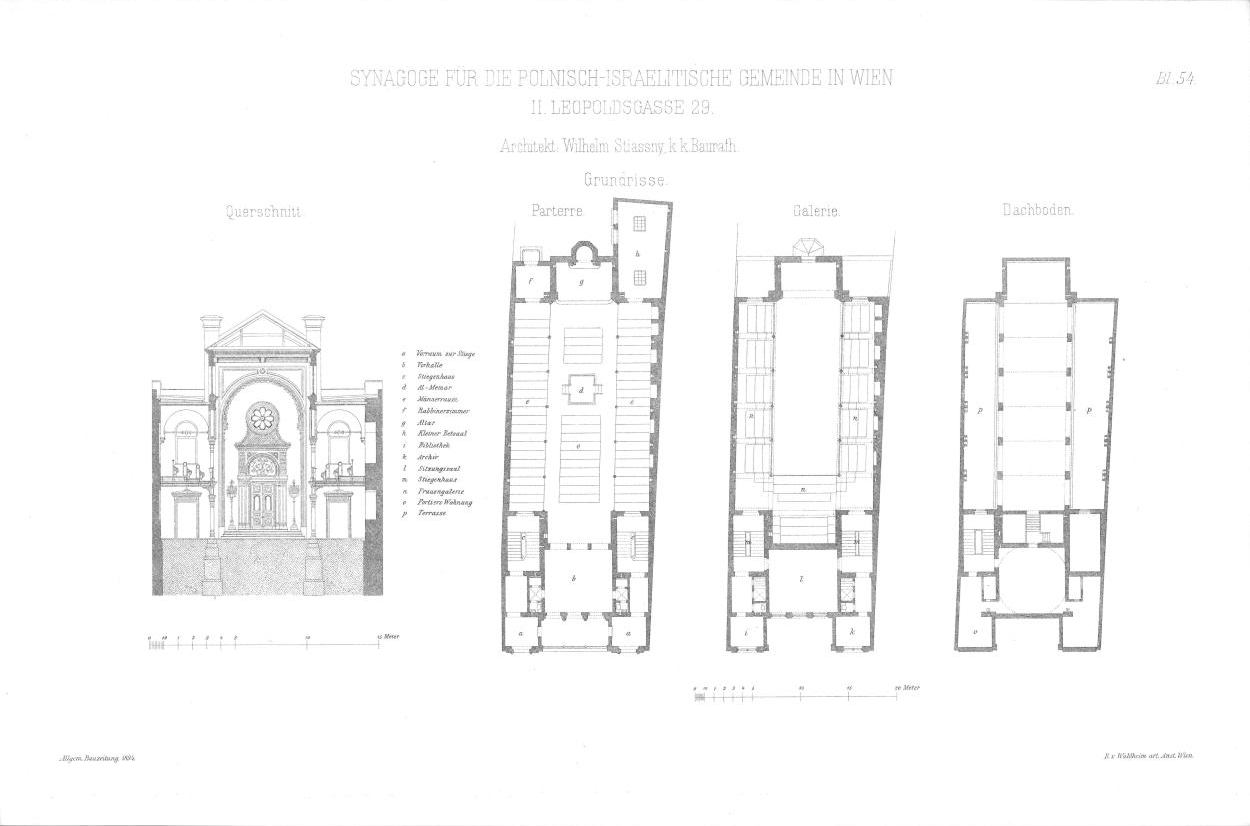 Allgemeine_Bauzeitung_1894_Polnische_Schul